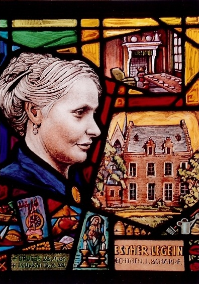 Glasraam van mevrouw Esther Legein, echtgenote van Lodewijk Scharpé. Maker: Frederic Roderburg